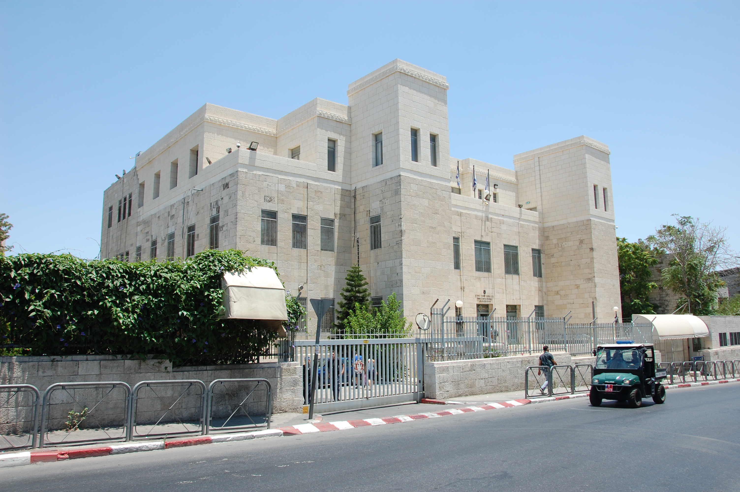 בית המשפט המחוזי ברחוב צלאח א-דין.